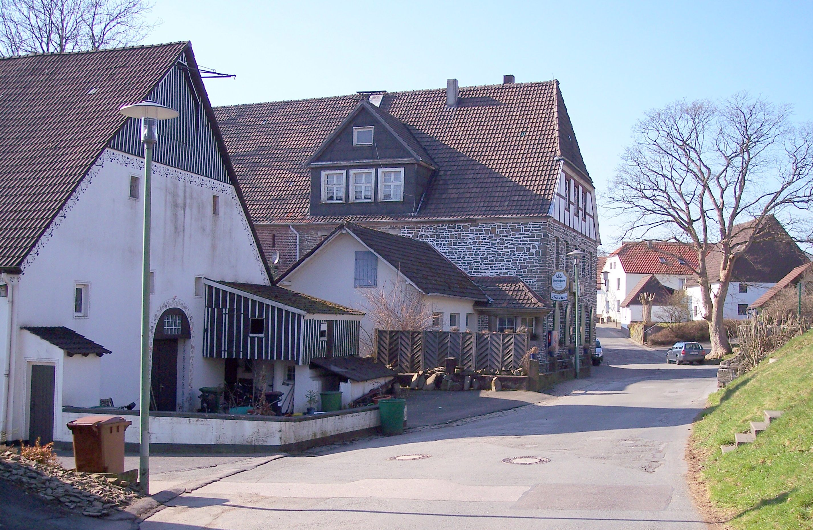 Lüdenscheid-Othlinghausen, Zentrum des alten Dorfes mit Gasthaus